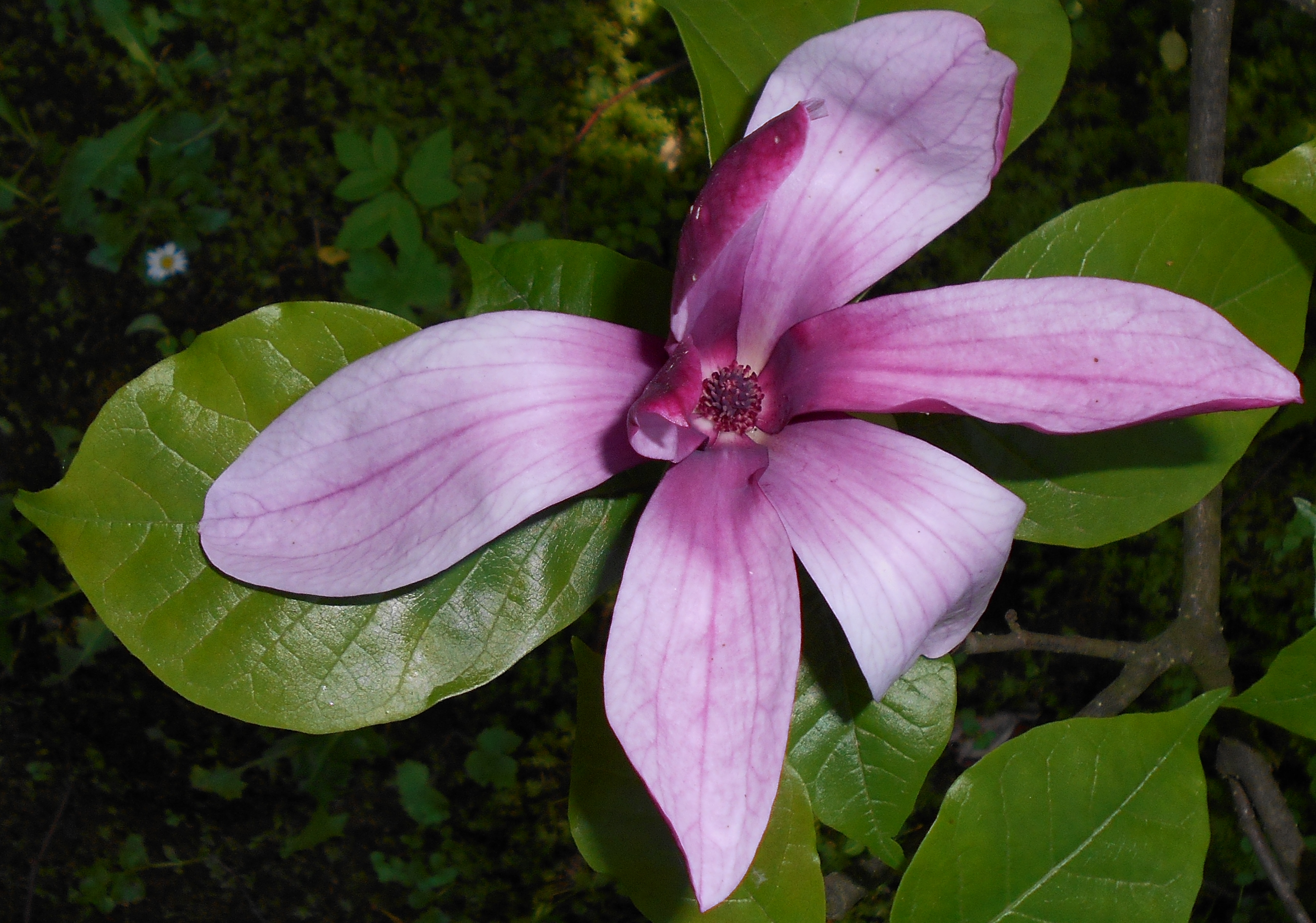 Magnolia purpurowa (Magnolia liliiflora), Ogród Botaniczny UMCS, Lublin, Polska.